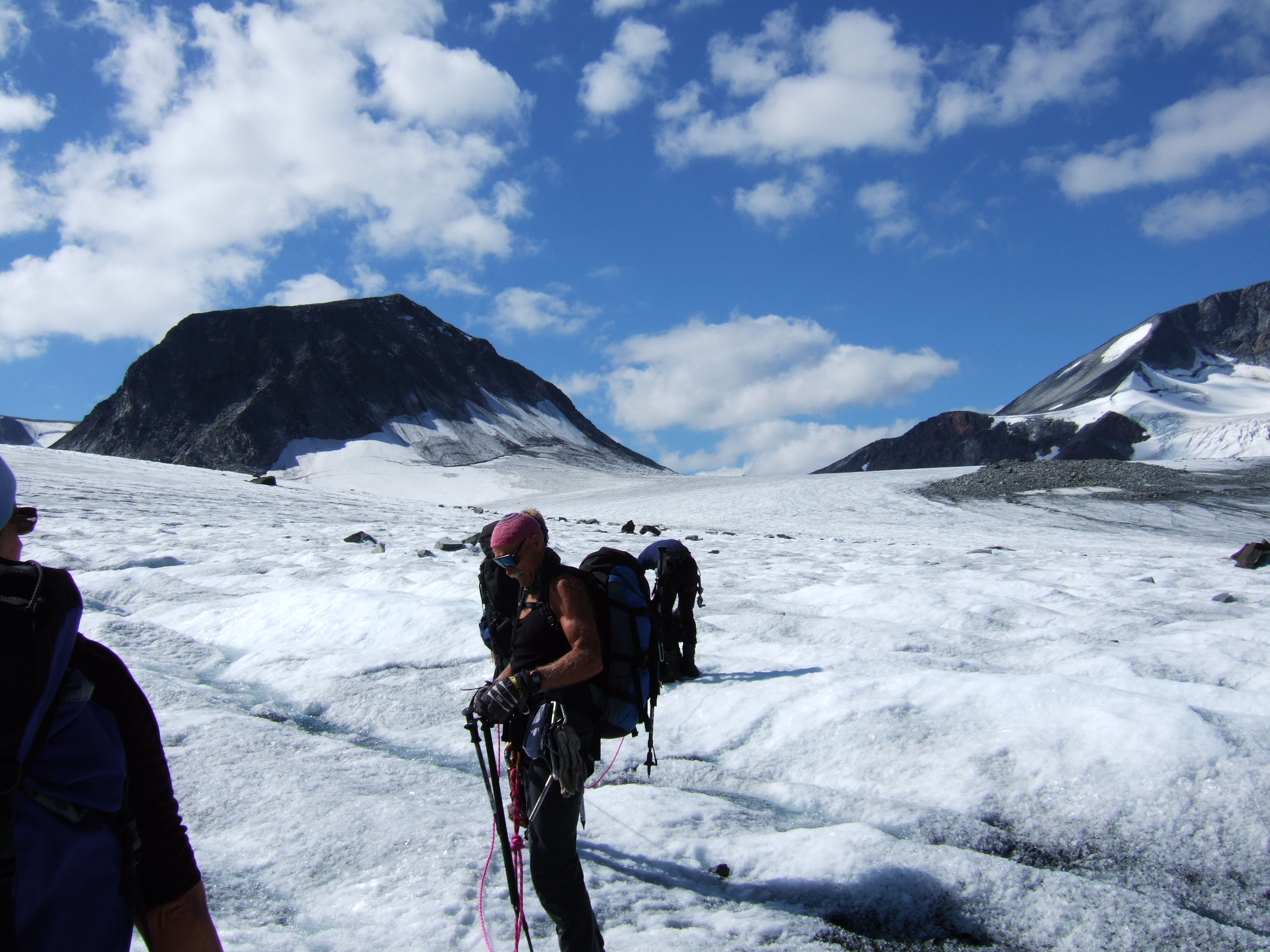 Brevandrere over Veobrean mitt imot Veobreatinden, Jotunheimen.